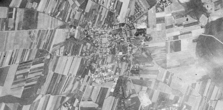 Buk sfotografowane przez amerykańskiego satelitę wywiadowczego Corona 98 (KH-4A 1023) w dniu 23 sierpnia 1965 r.